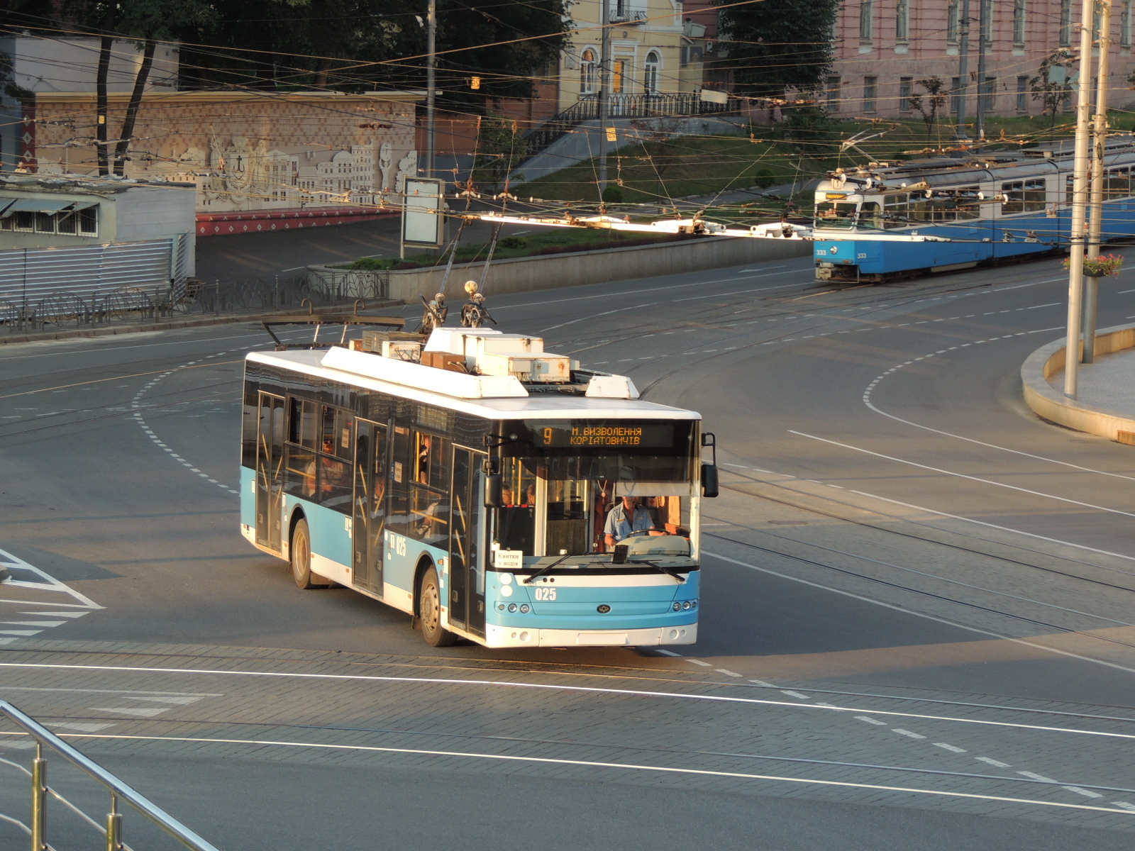 Троллейбус Богдан на площади Гагарина(Винница)